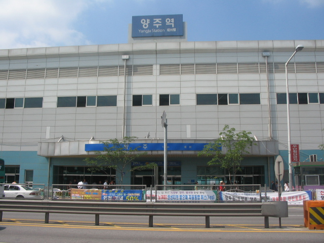 楊州駅 駅舎